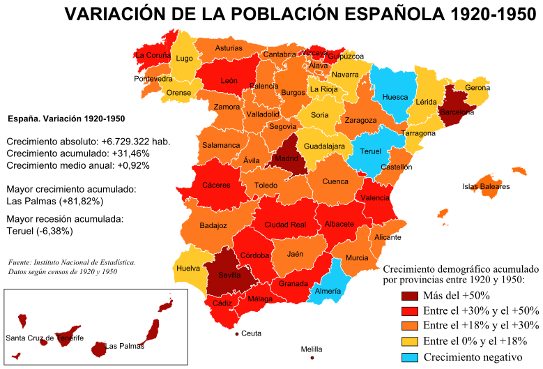 Mapa de España con las variaciones de población por provincias en el periodo 1920-1950, según los censos correspondientes del Instituto Nacional de Estadística.